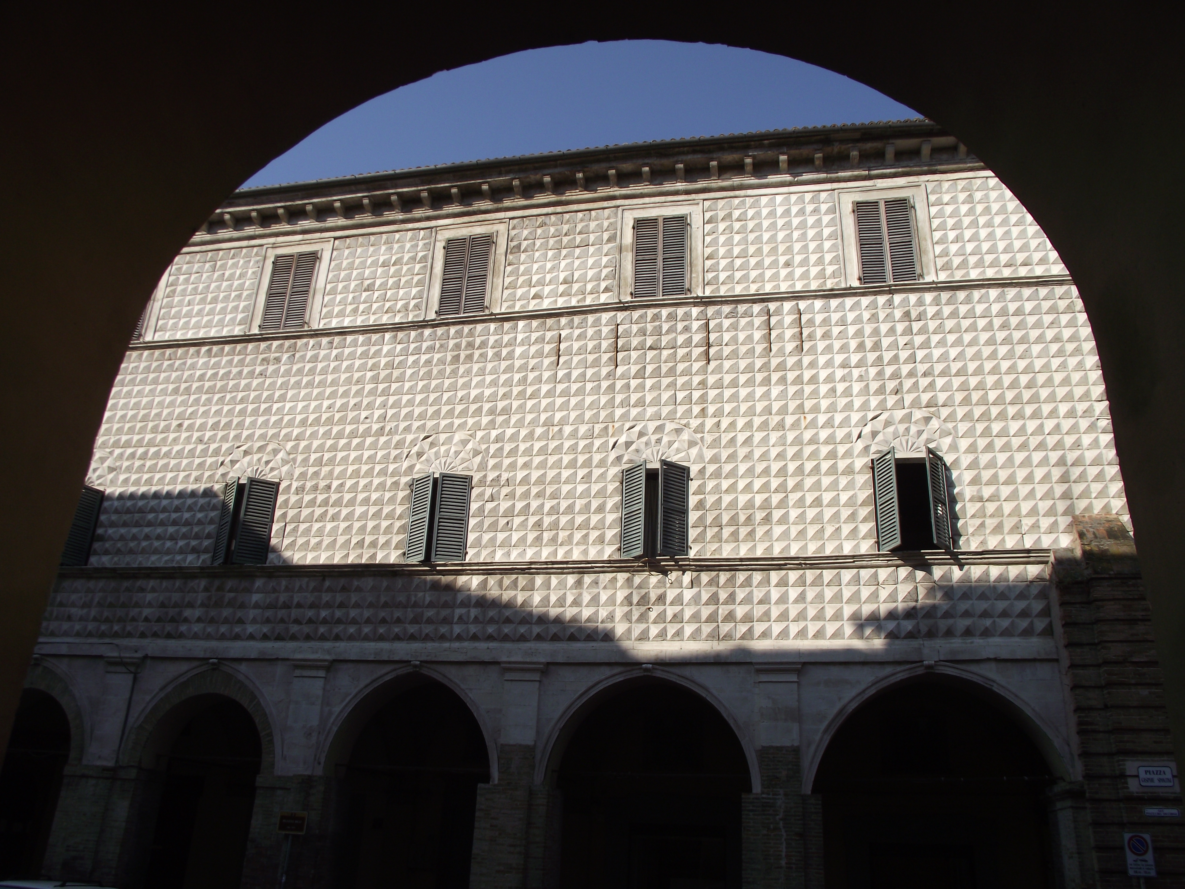 Jesi, Palazzo Ricci, G.di Bellinzona e P.di B.di Carena, 1544